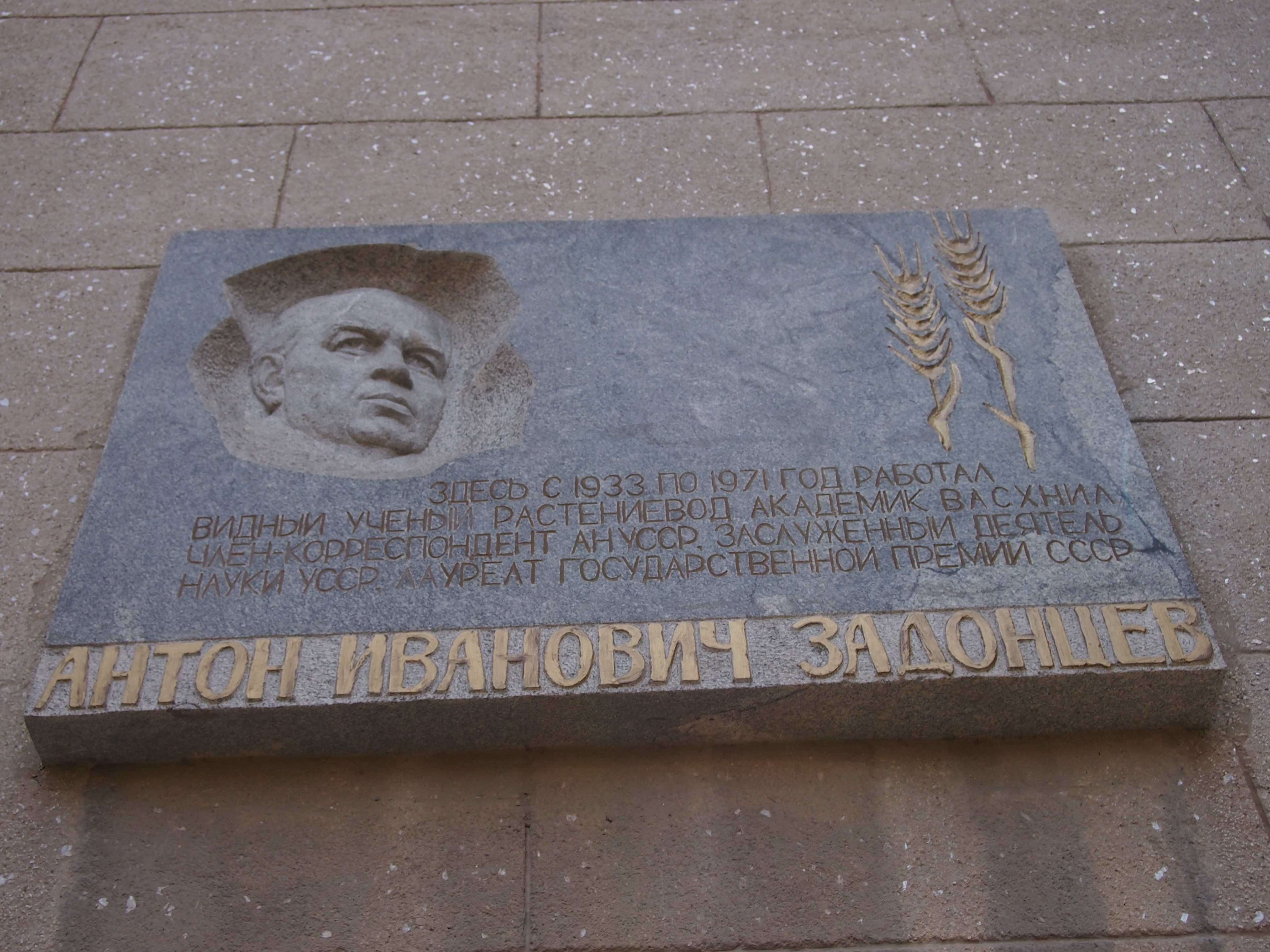 Будівля Всесоюзного науково-дослідного інституту кукурудзи. Мем. дошка Пам'ятний знак на честь видатного вченого-рослинознавця, академіка, лауреата Державної премії СРСР Задонцева А.І. (1908-1971), який працював у Всесоюзному науково-дослідницькому інституті кукурудзи, Дніпропетровськ, Дзержинського вул., 14